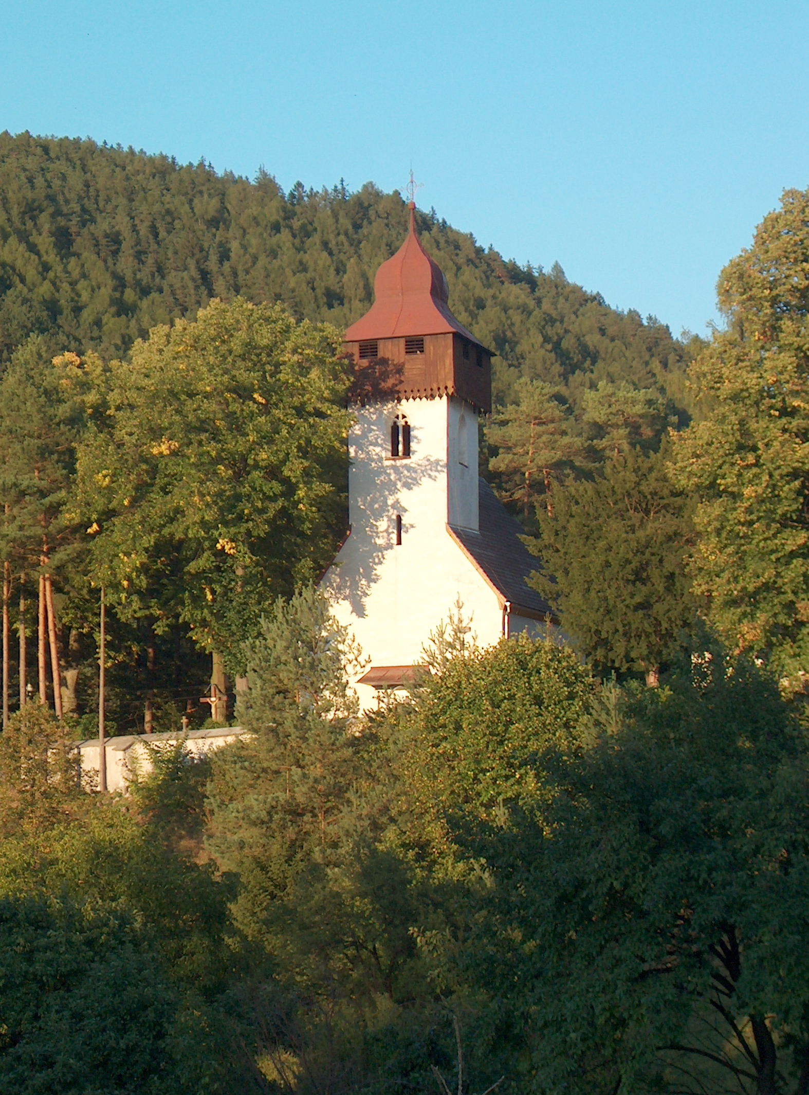 Necpaly - Rímsko-katolícky kostol svätého Ladislava